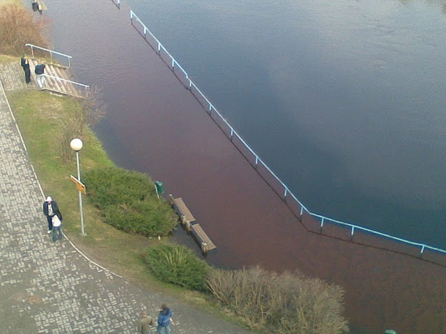 Emajõe käär Tartus turu juures üleujutuse ajal, vaade Dorpati hotellist.